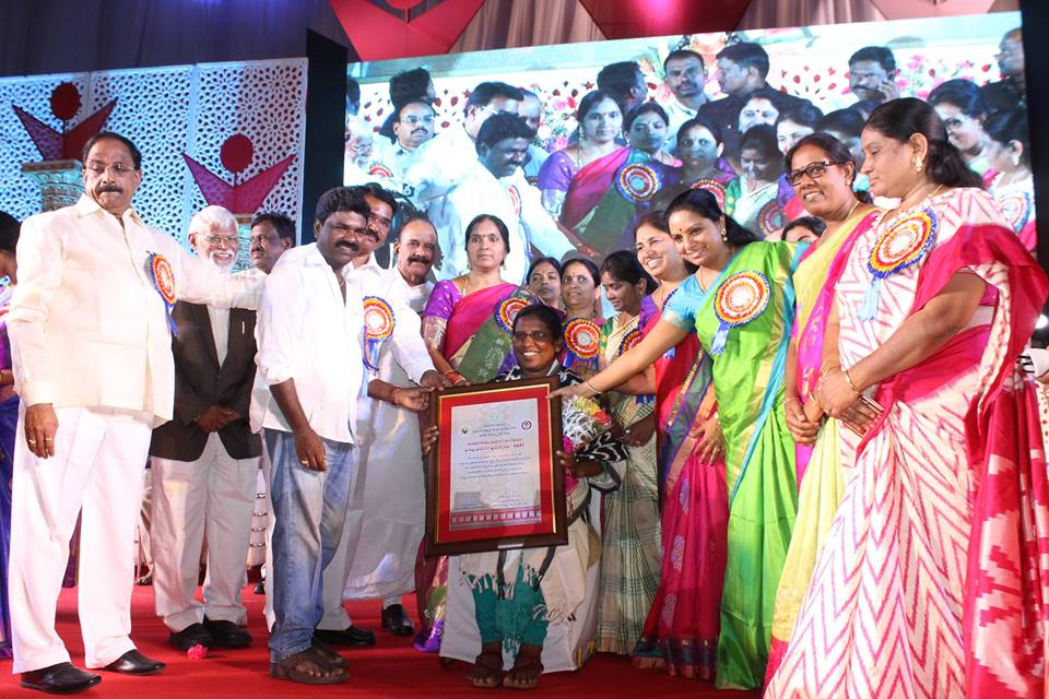 తెలంగాణ రాష్ట్ర విశిష్ట మహిళా పురస్కారం అందుకుంటున్న కట్ట కవిత